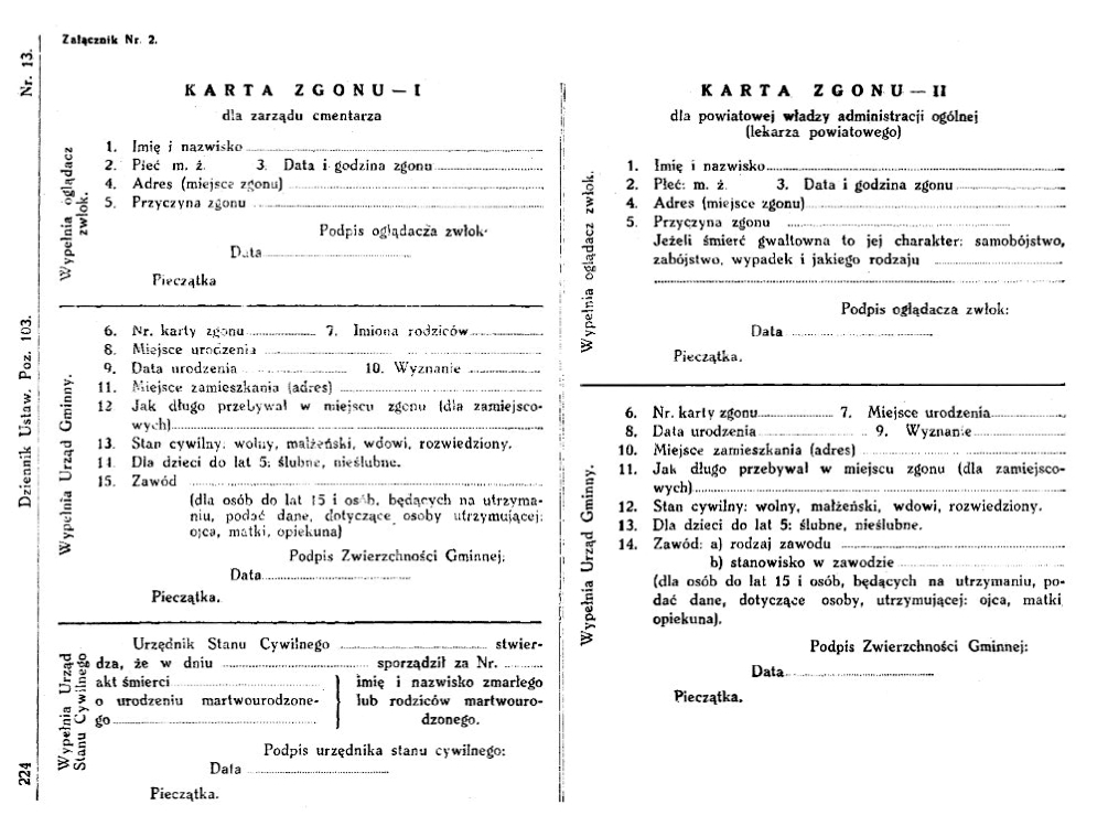 Karta zgonu - załącznik nr 2 do rozporządzenia z 30 listopada 1933 roku